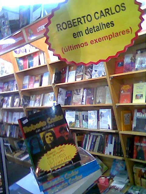 (portuguese)A biografia do cantor brasileiro Roberto Carlos, de autoria de Paulo César de Araújo,à venda nas livrarias mesmo depois de ter sido apreendida judicialmente